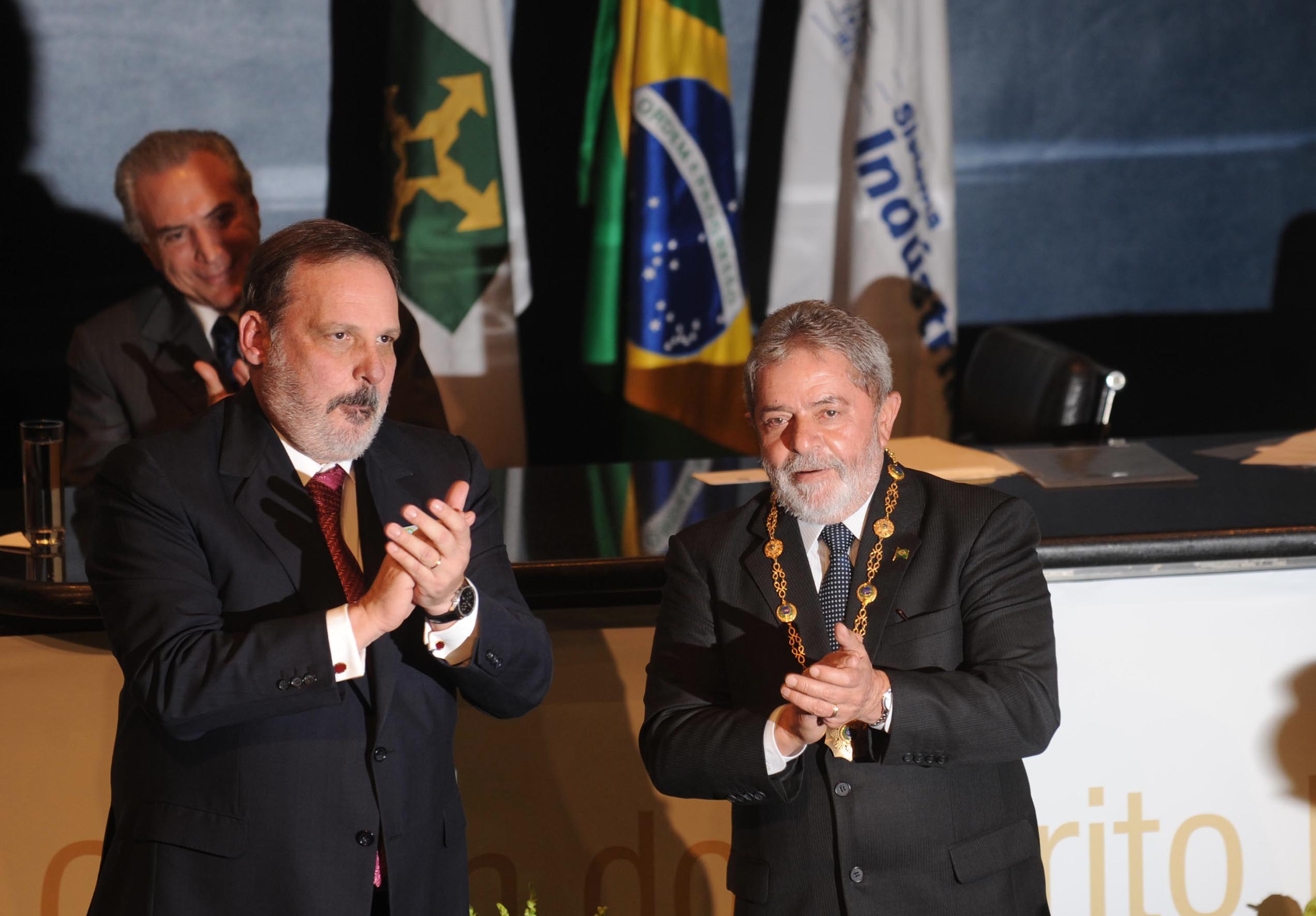 O presidente da CNI, Armando Monteiro Neto, e o presidente Lula durante cerimônia de comemoração dos 71 anos da Confederação Nacional da Indústria (CNI).